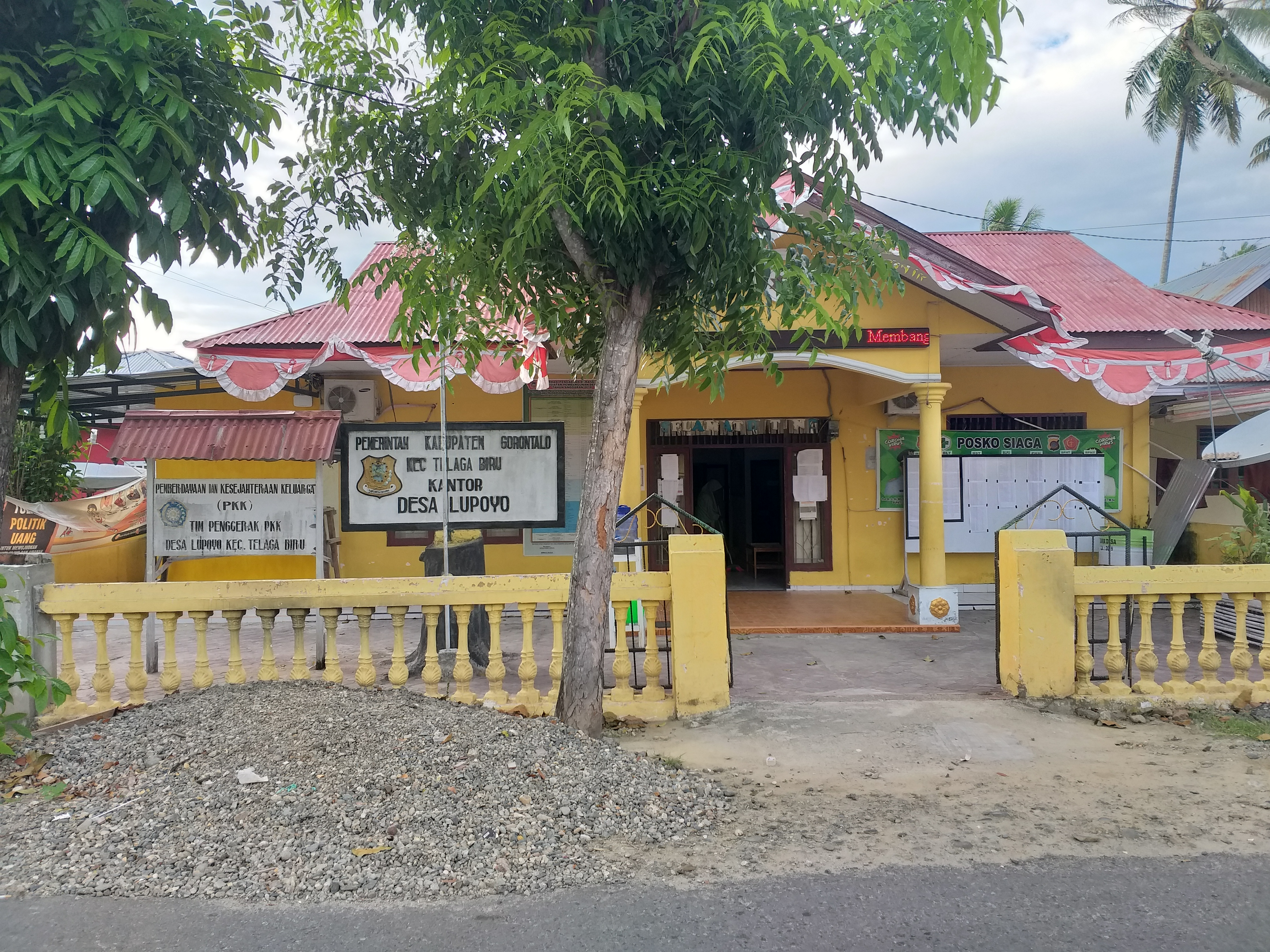 Kantor Desa Lupoyo Kec. Telaga Biru Kab. Gorontalo